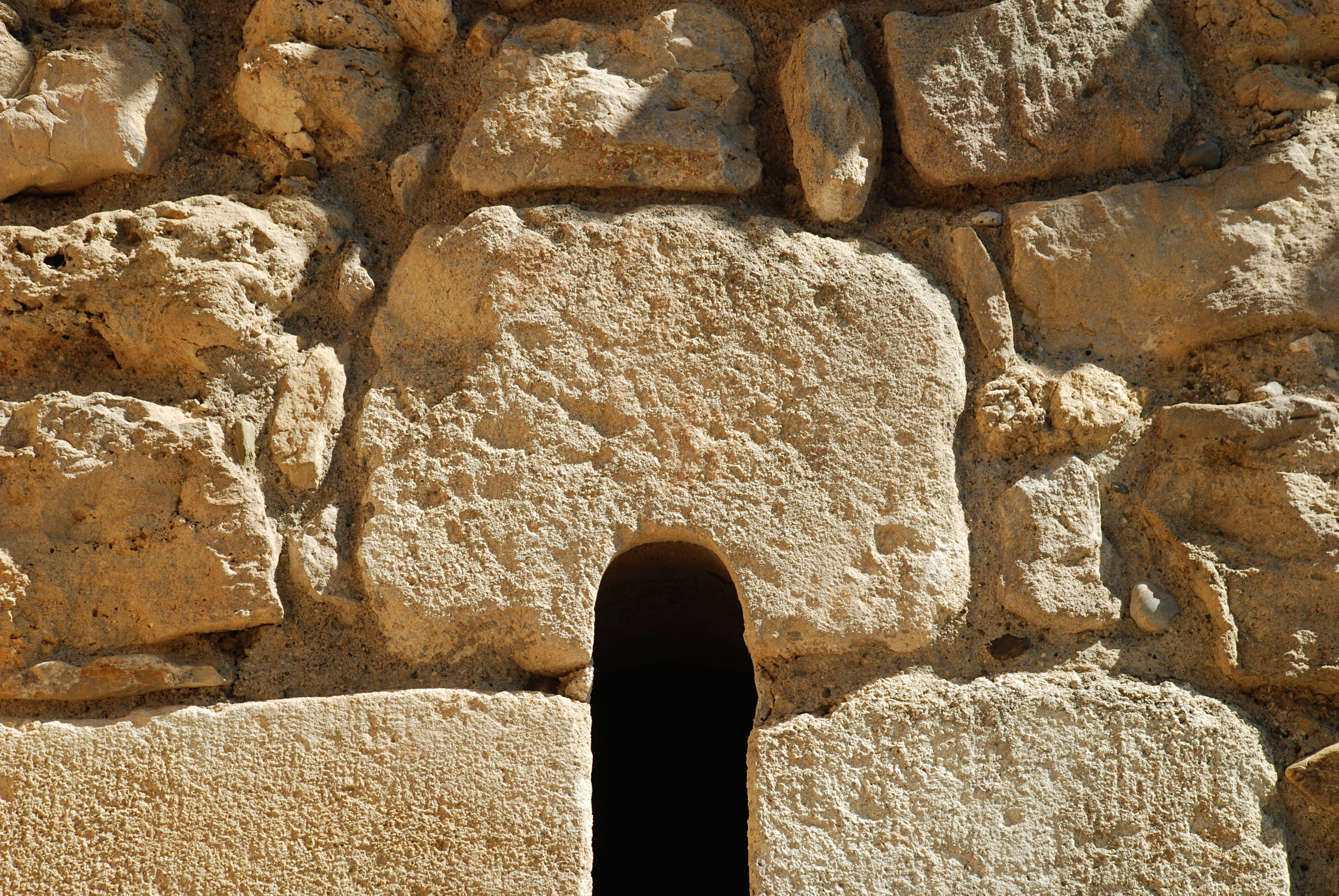 France - Languedoc - Aude - Moussan - chapelle Saint-Laurent (préroman) - linteau monolithe de la baie de la face sud du chevet .